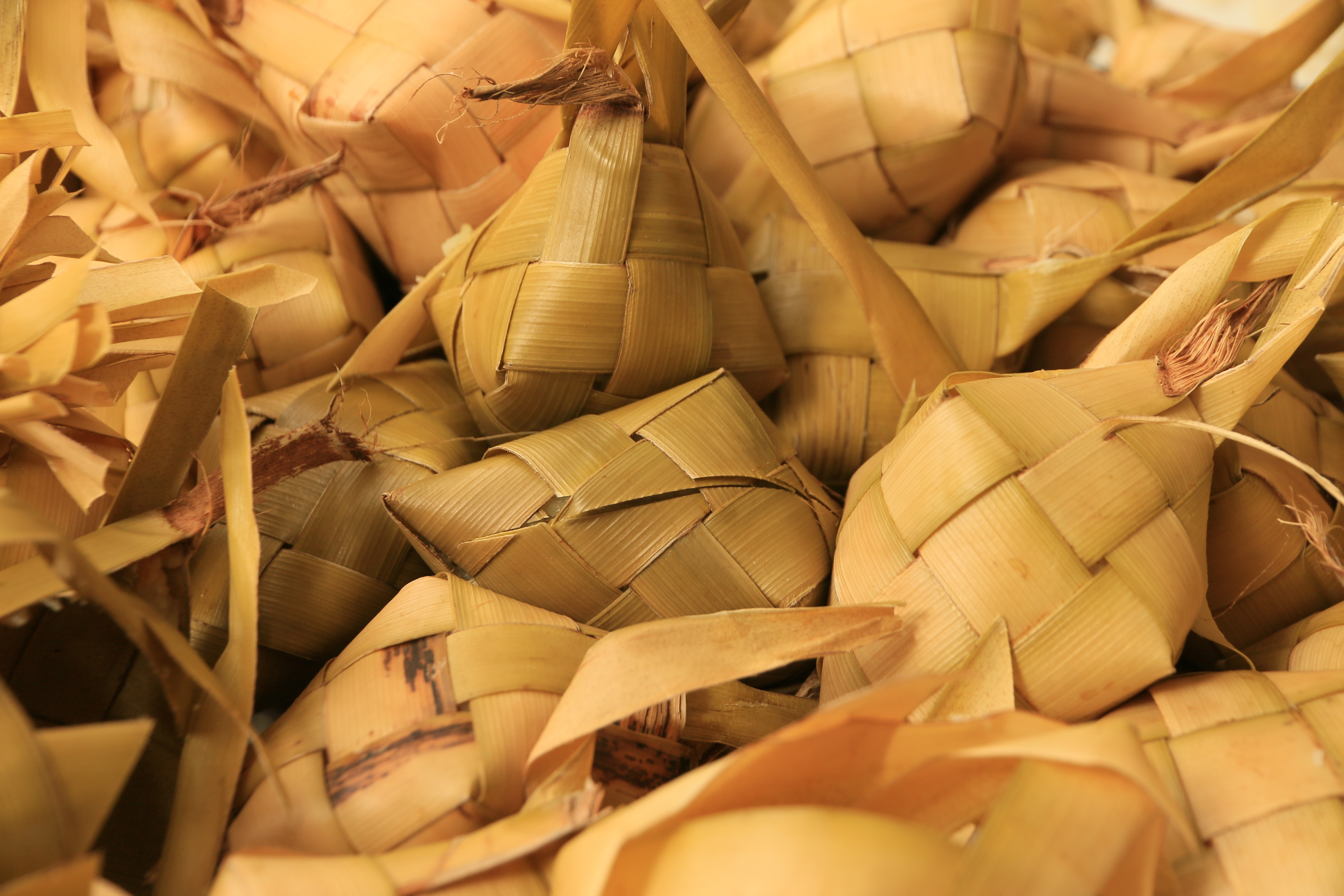 Organic packing rice cebu 2017